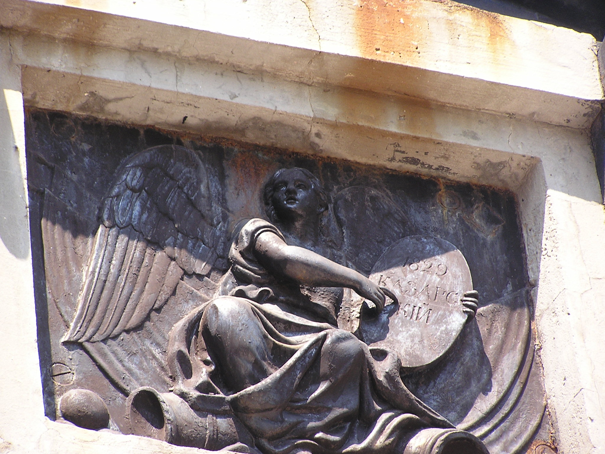 Севастополь. Памятник Казарскому